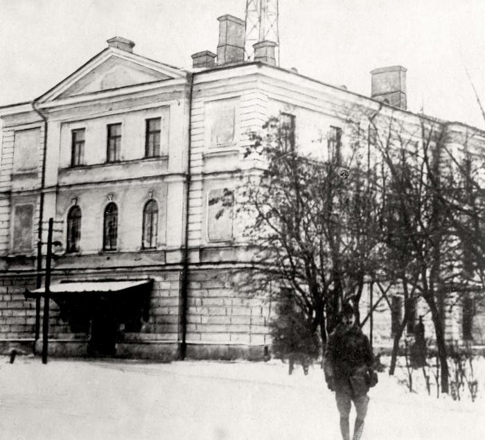 Здание Белого дворца Брест-Литовской крепости, в котором 3 марта 1918 года был заключён Брестский мир. Фото 1915 года.